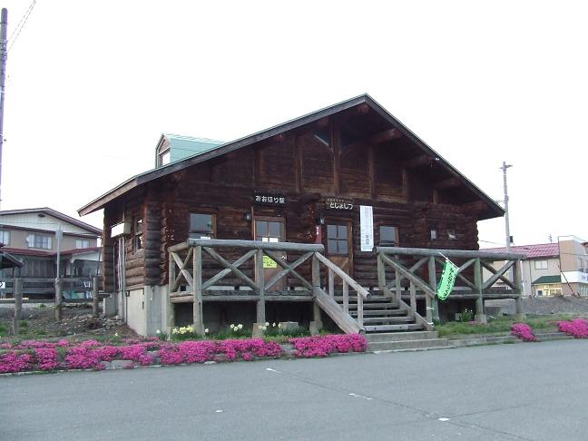 JR大堀駅駅舎